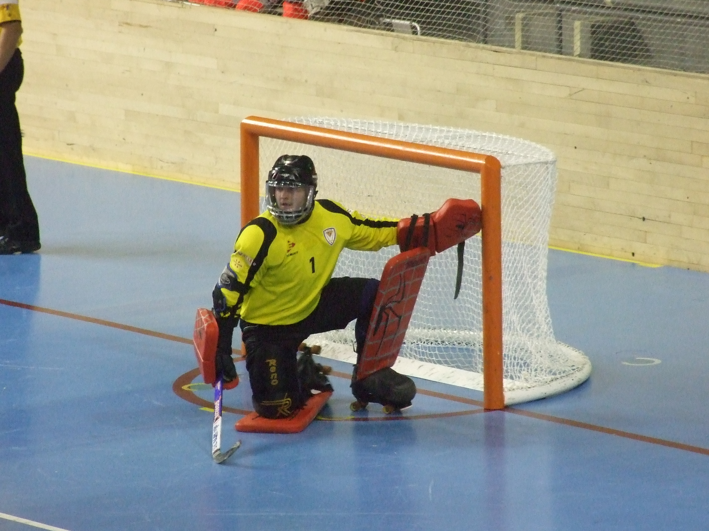 Elagi Deitg con el Igualada en un partido de liga ante el F.C. Barcelona